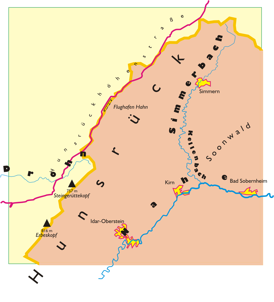 Verlauf der Hunsrückhöhenstraße zwischen Wassereinzugsgebiet der Nahe und der Mosel